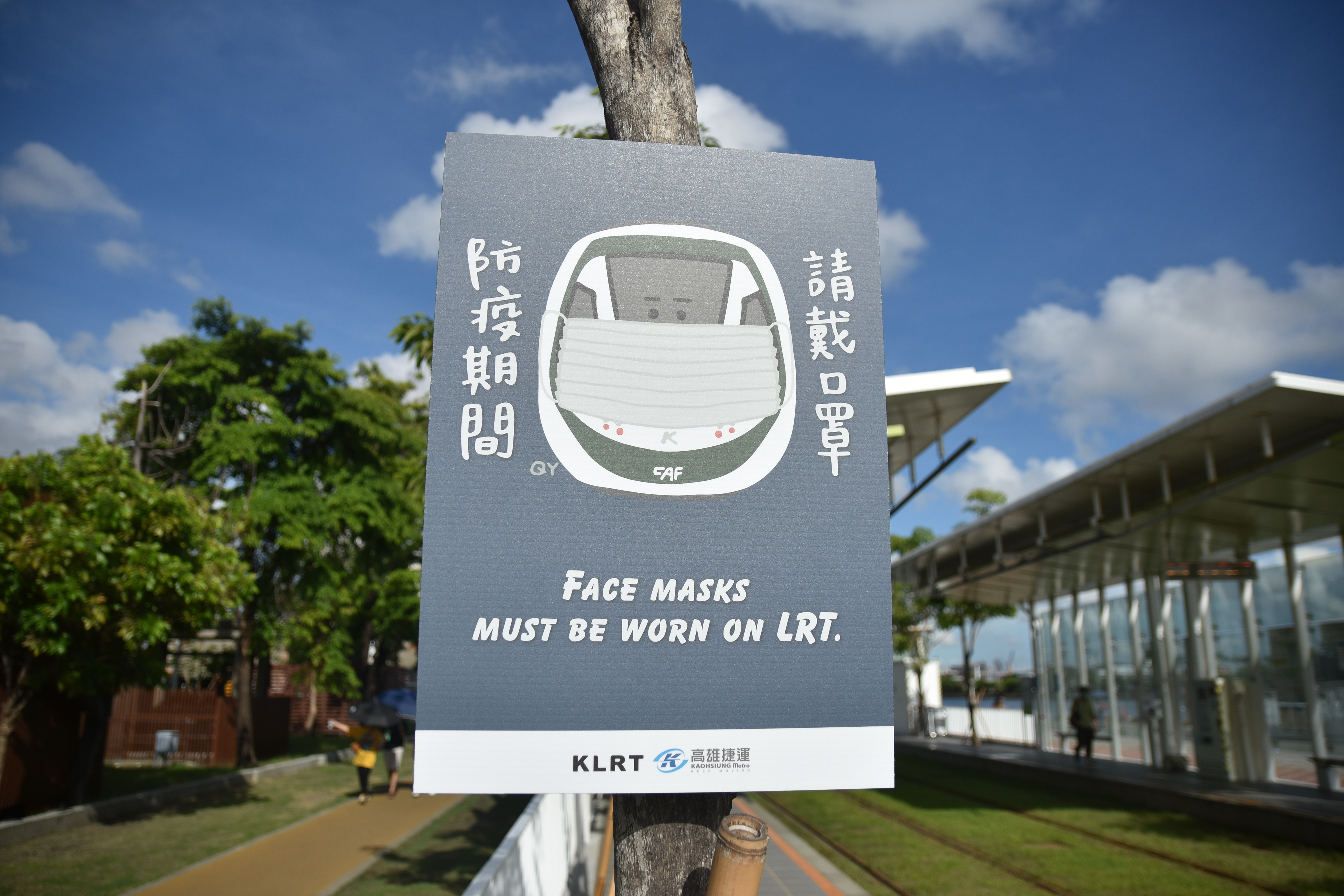 中文（台灣）: 輕軌駁二大義站 口罩告示